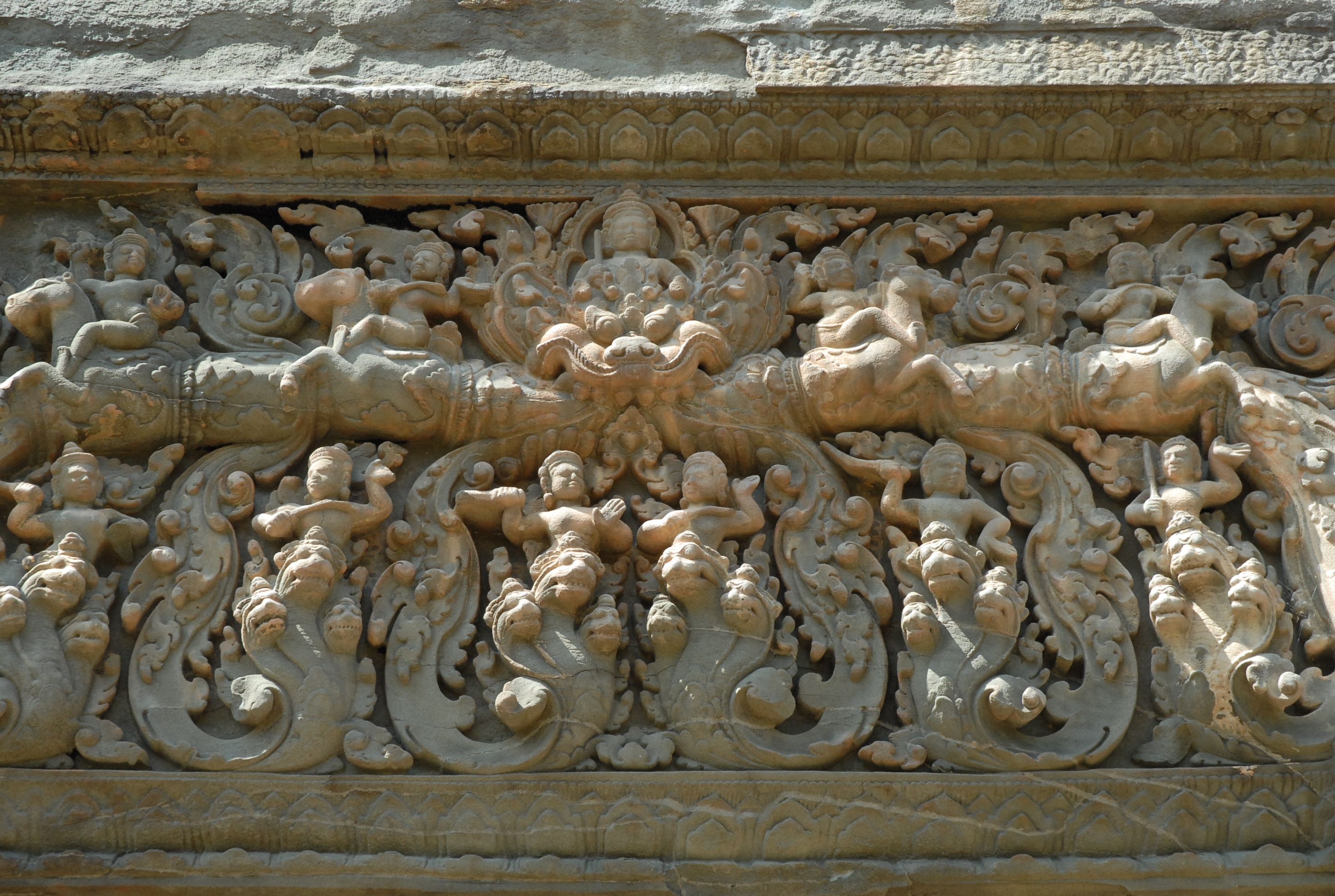 Cambodge, site archéologique d'Angkor (zone de Rolûos), temple de Preah Kô : linteau de porte